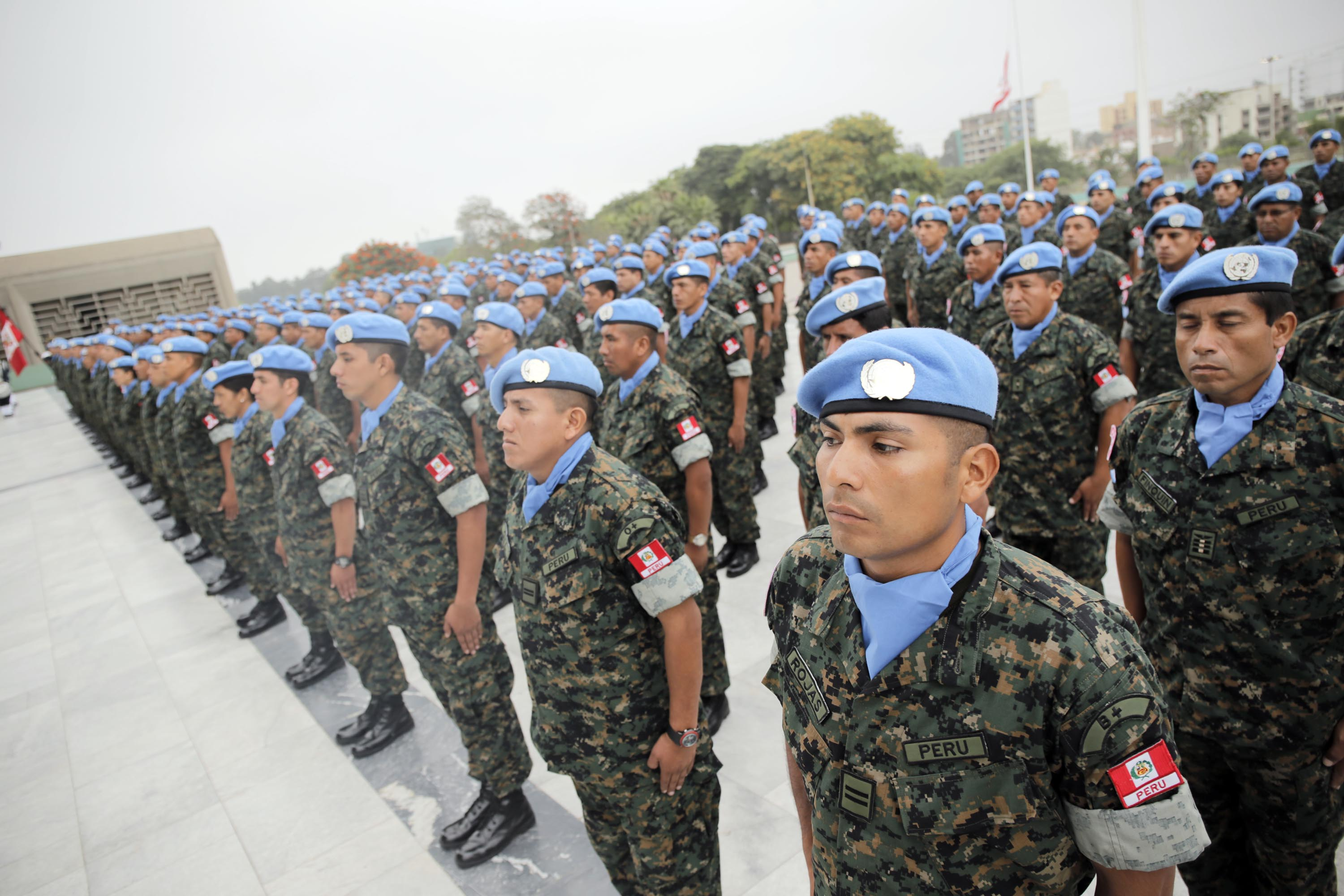 El ministro de Defensa, Pedro Cateriano Bellido, presidió la ceremonia de despedida del vigésimo contingente de Cascos Azules que partirá a Haití.